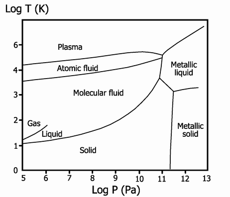 Фазовая диаграмма водорода